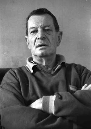 Karinthy Ferenc utolsó fényképe (Budapest, 1991. december)